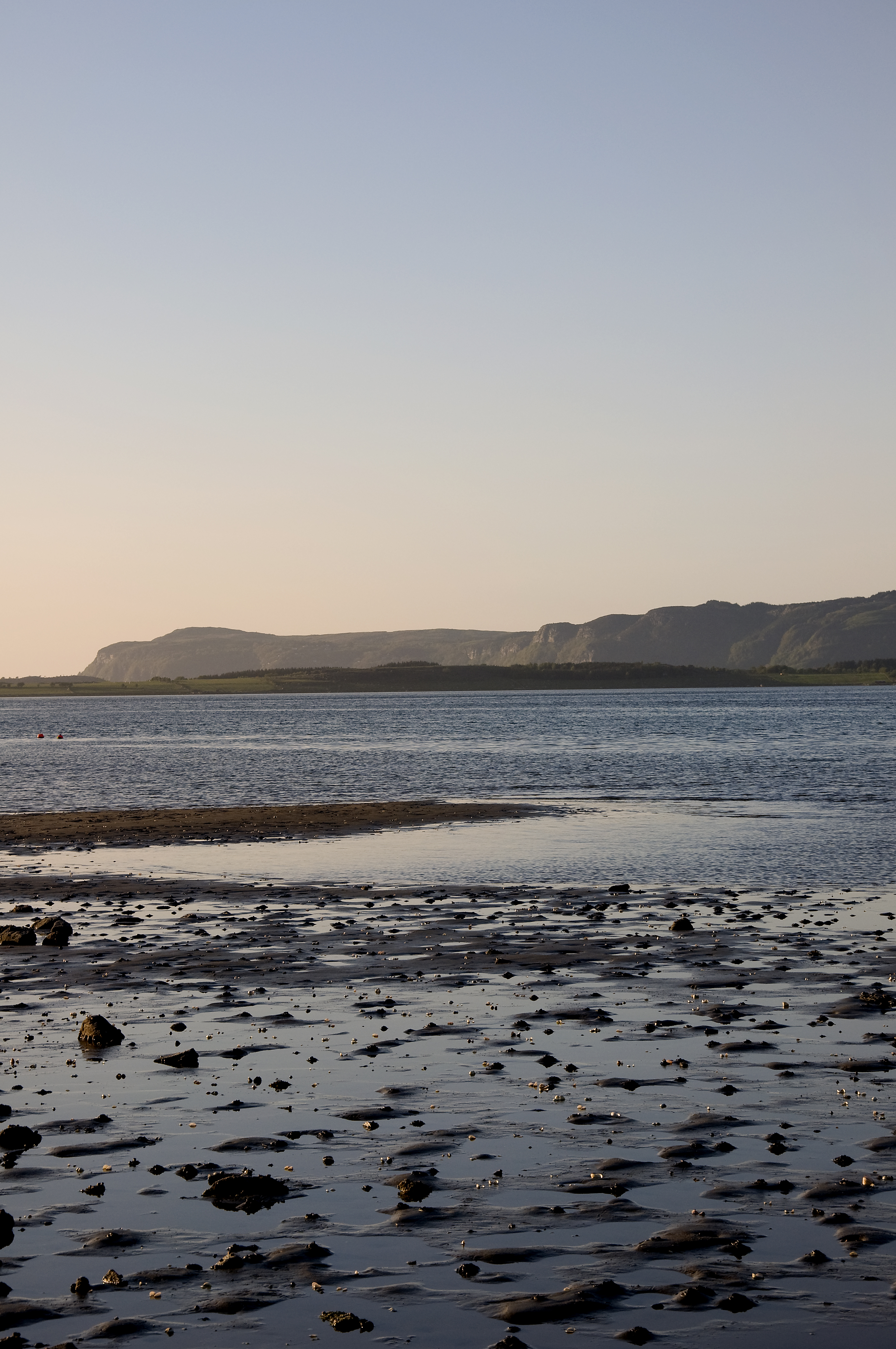 Åmøyfjorden